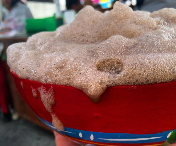 Bebida de Cacao